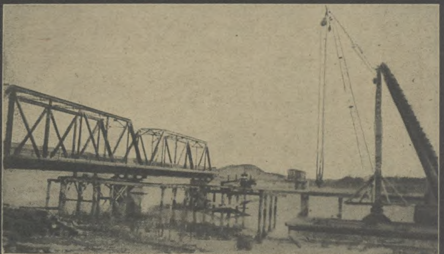 中文（香港）: 建筑中的公益鐵橋